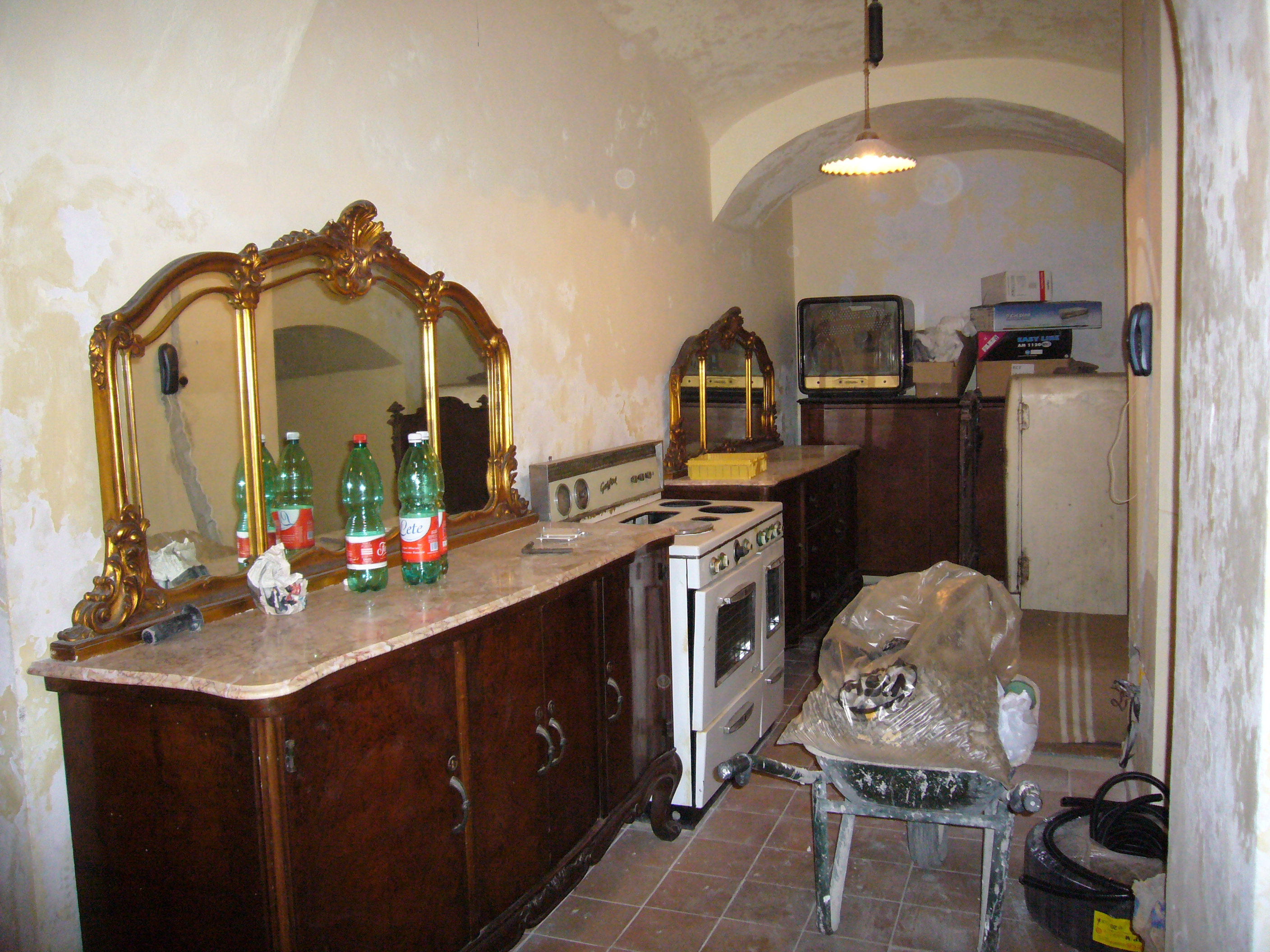 Napoli sotterranea: il basso a Vico Cinquesanti da cui si accede al Teatro greco